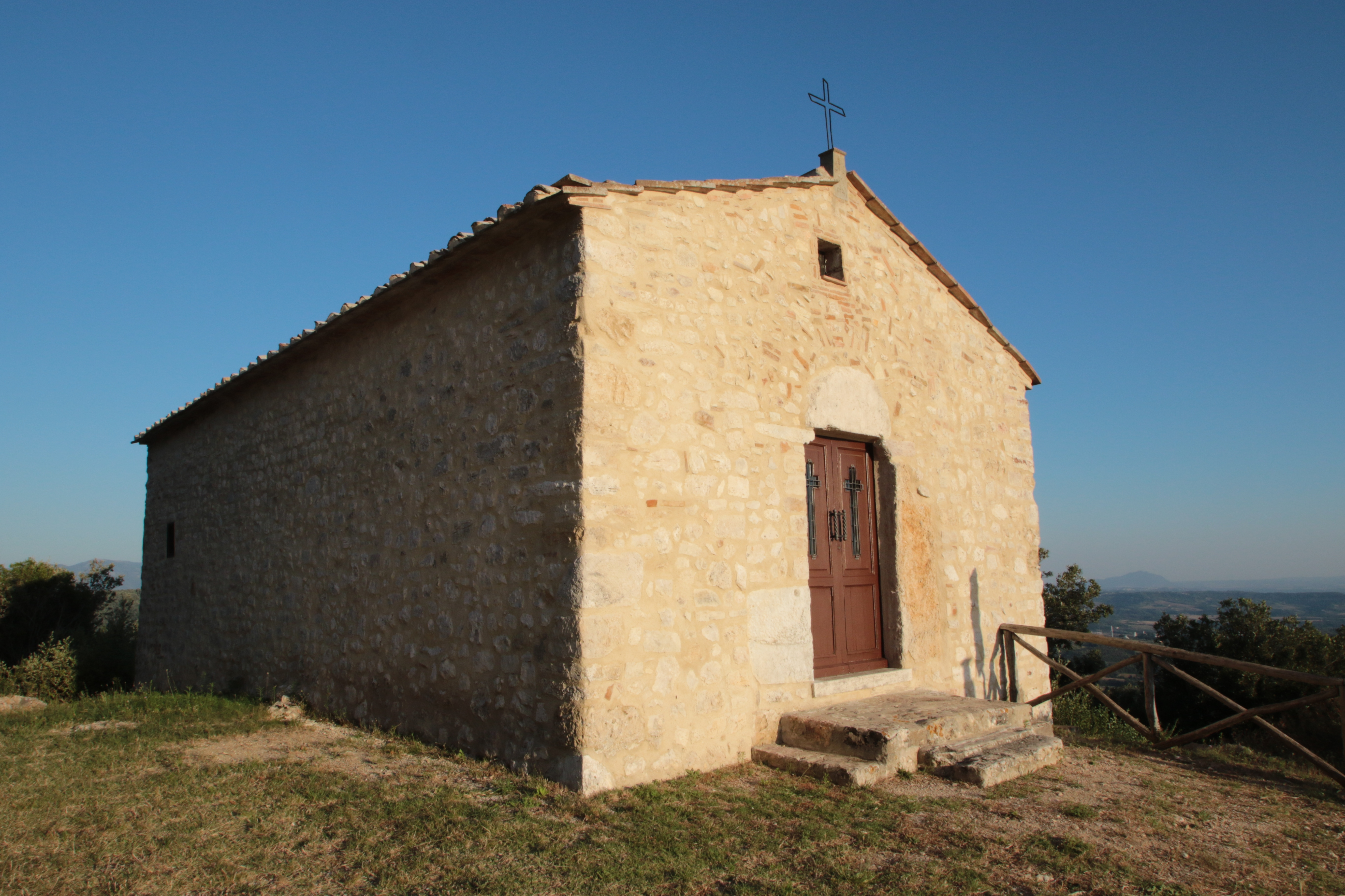 Frontale della chiesa di San Silvestro (1400 ca) situata in località Fornole, frazione del comune di Amelia in provincia di Terni (TR) in Umbria